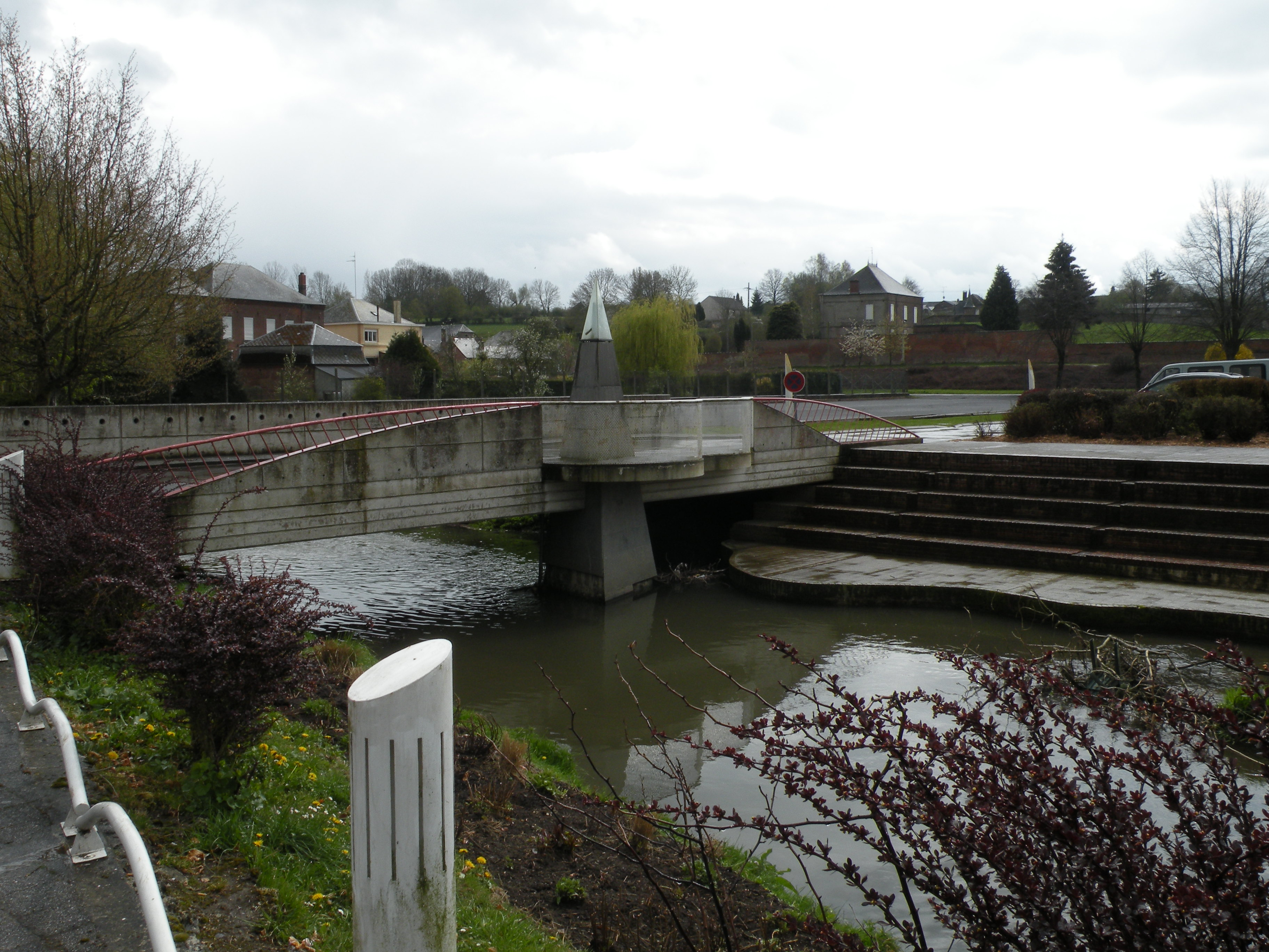 pont devant le mairie Wignehies